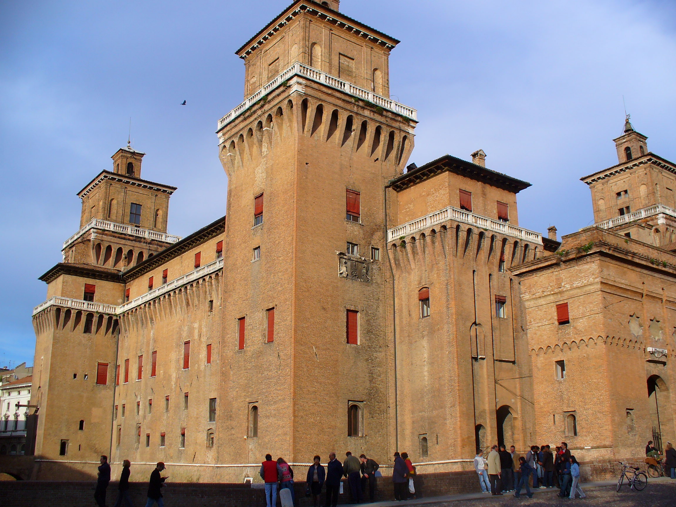 Le château d'Este de Ferrare